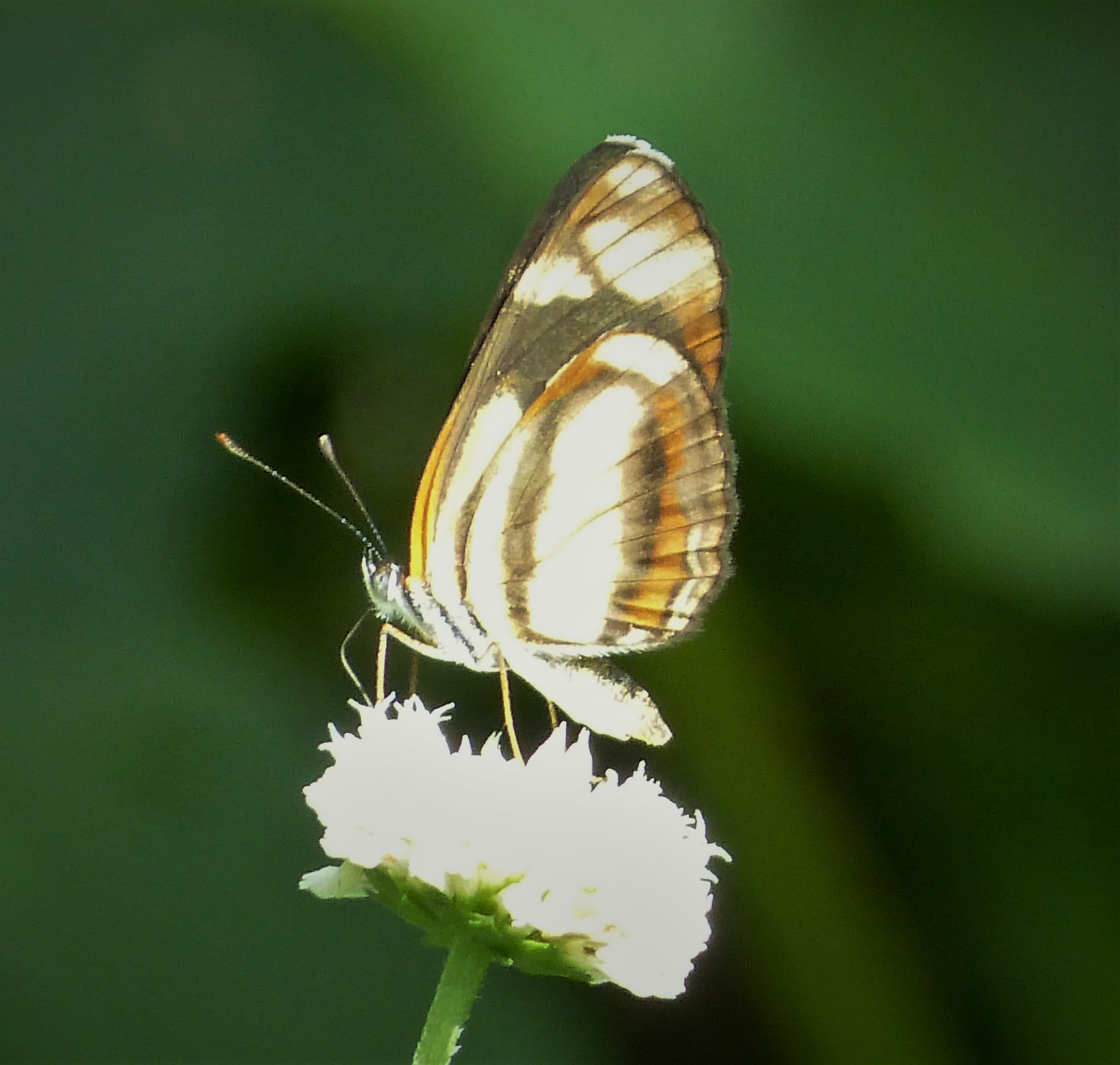 San Vincente, River, Chiriqui Prov, Panama